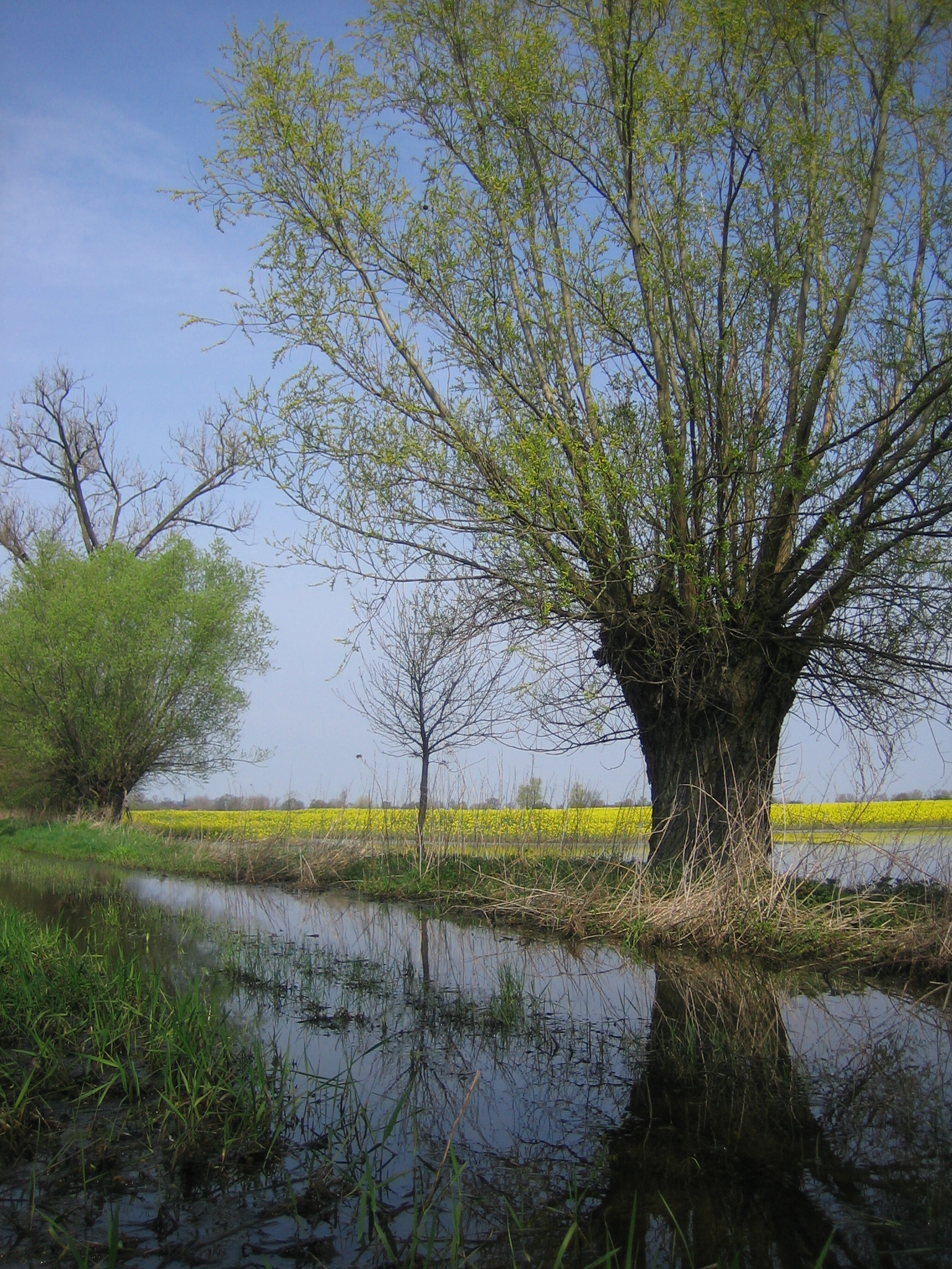 Am Pilgerweg Belin-Wilsnack zwischen Barsikow und Metzelthin